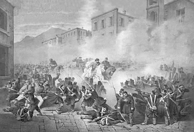 Giuseppe Garibaldi entra a Palermo da Porta Termini, litografia.